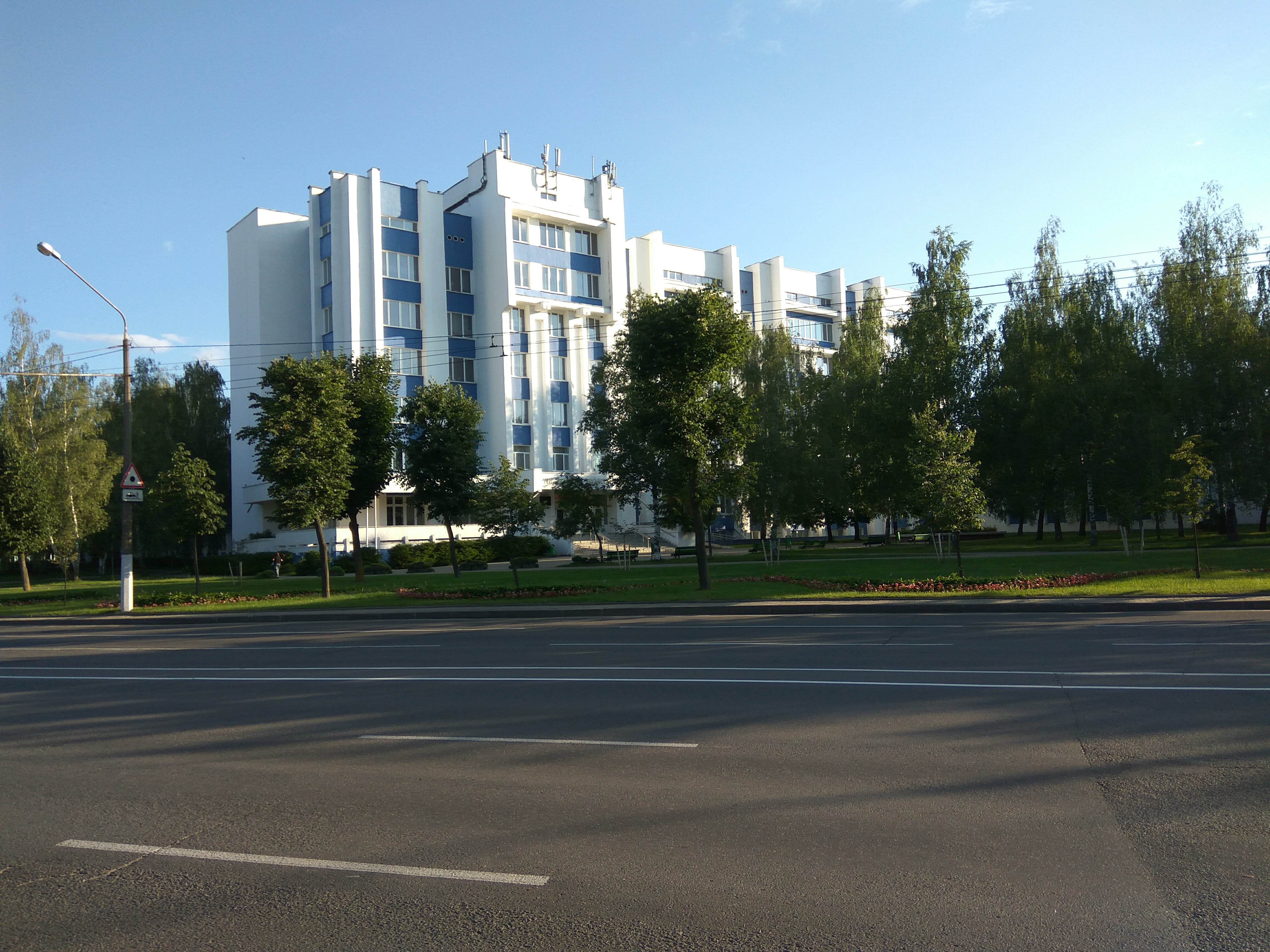 Магілёў. Магілёўскі дзяржаўны ўніверсітэт харчавання